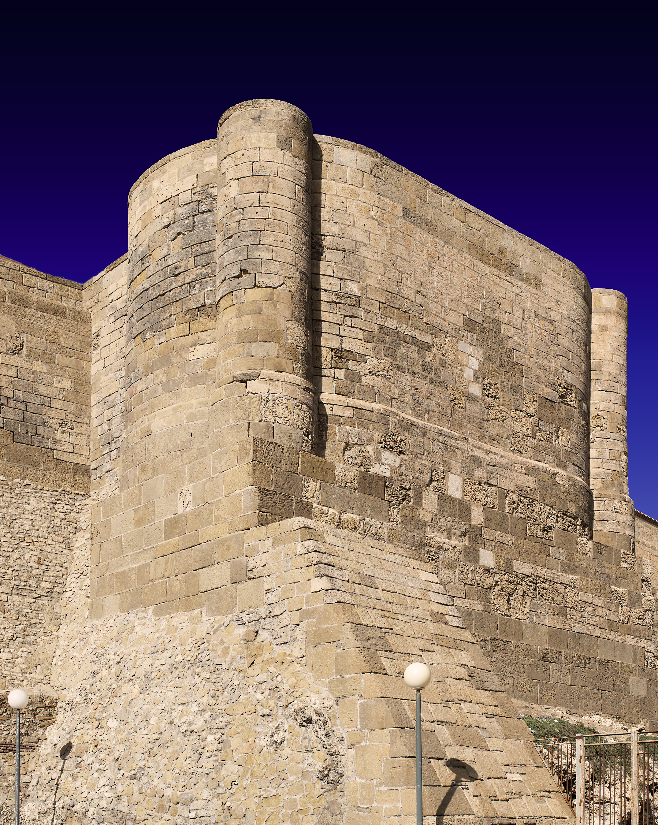 El Torreón de los Bolaños o de las Pelotas es un torreón situada en el Frente de Levante de Melilla la Vieja de la ciudad española de Melilla.